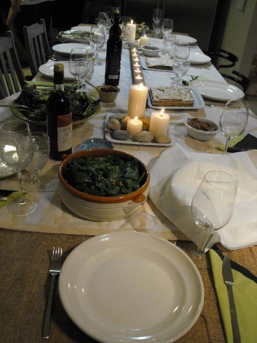 שולחן ערוך, מוכן ומזומן לארוחת ליל הסדר